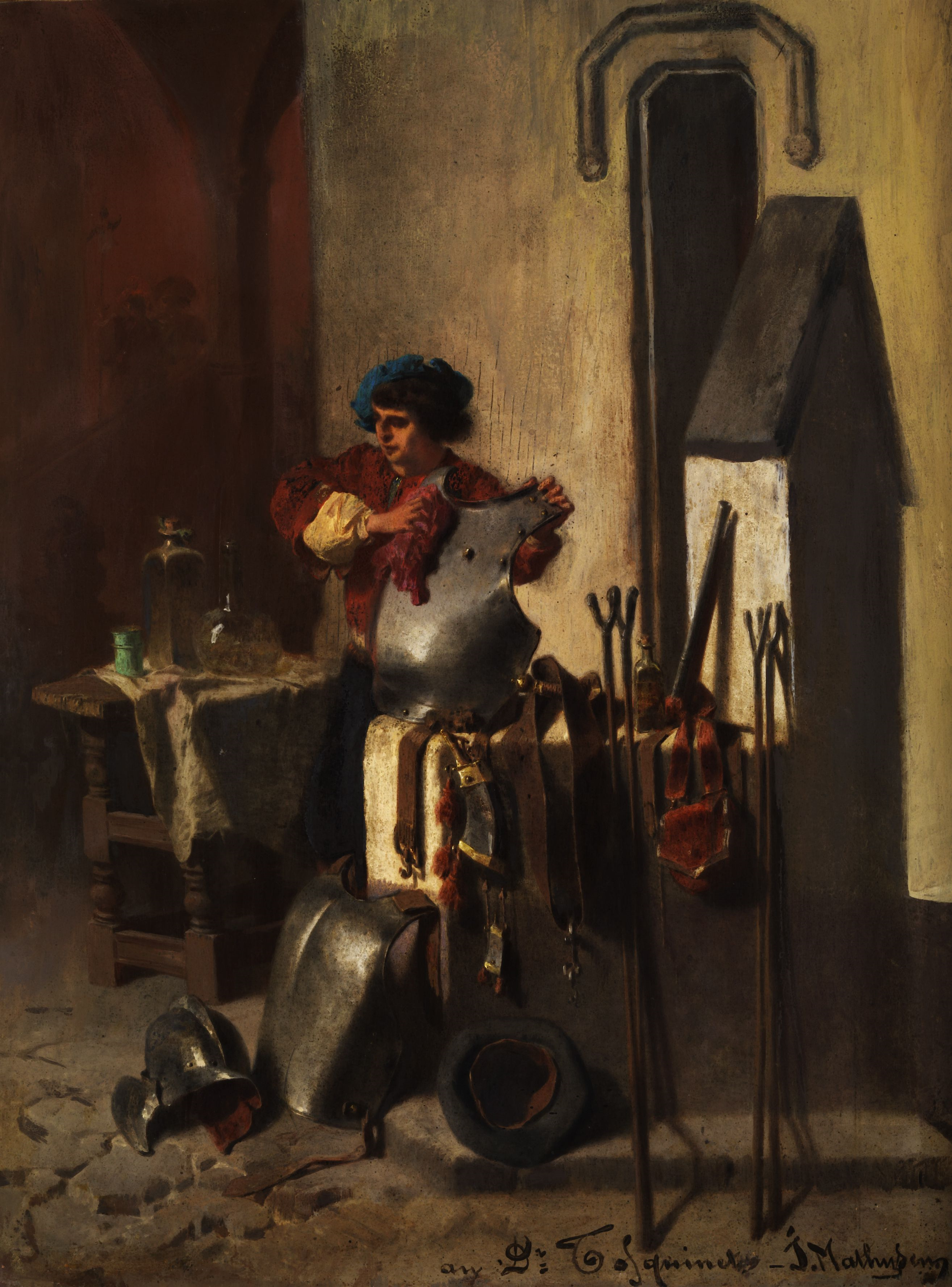 Knappe in einer Waffenkammer. Öl auf Holz. 36 x 26,5 cm.